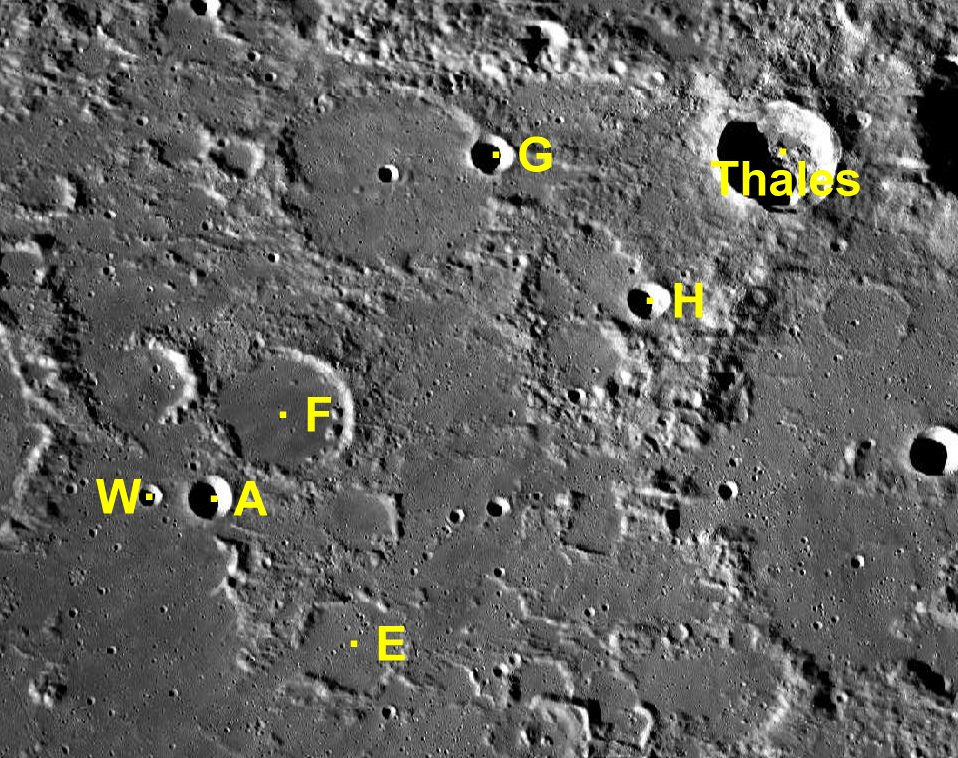 Cráter lunar Thales. Cráteres satélite. (Imagen LRO)